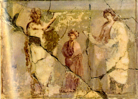 Урок музыки в древнем Риме (Помпеи, I в. н.э.)